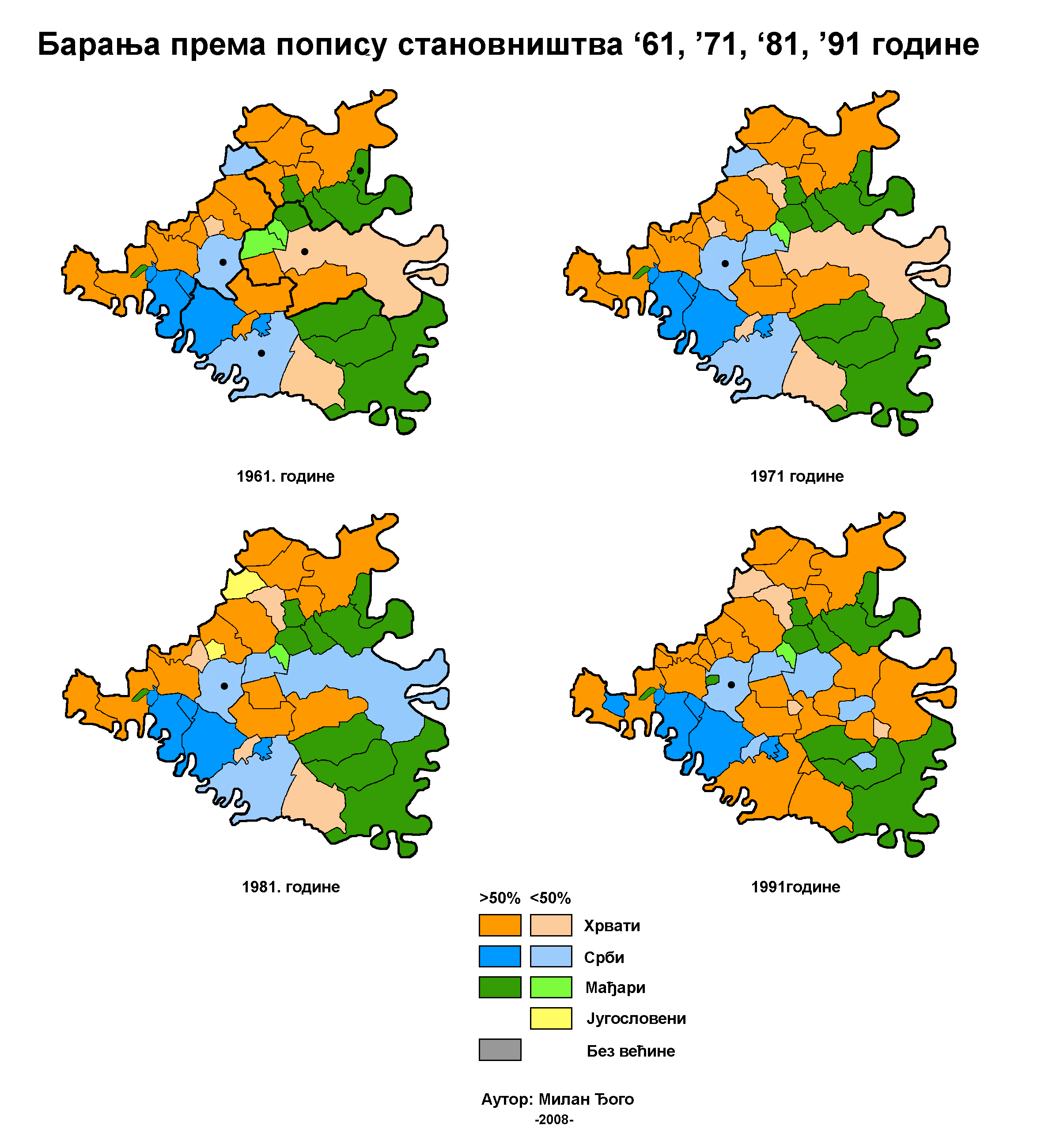 Etnička karta Baranje (deo koji se nalazi u Hrvatskoj) na osnovu popisa stanovništva 61, 71, 81, 91